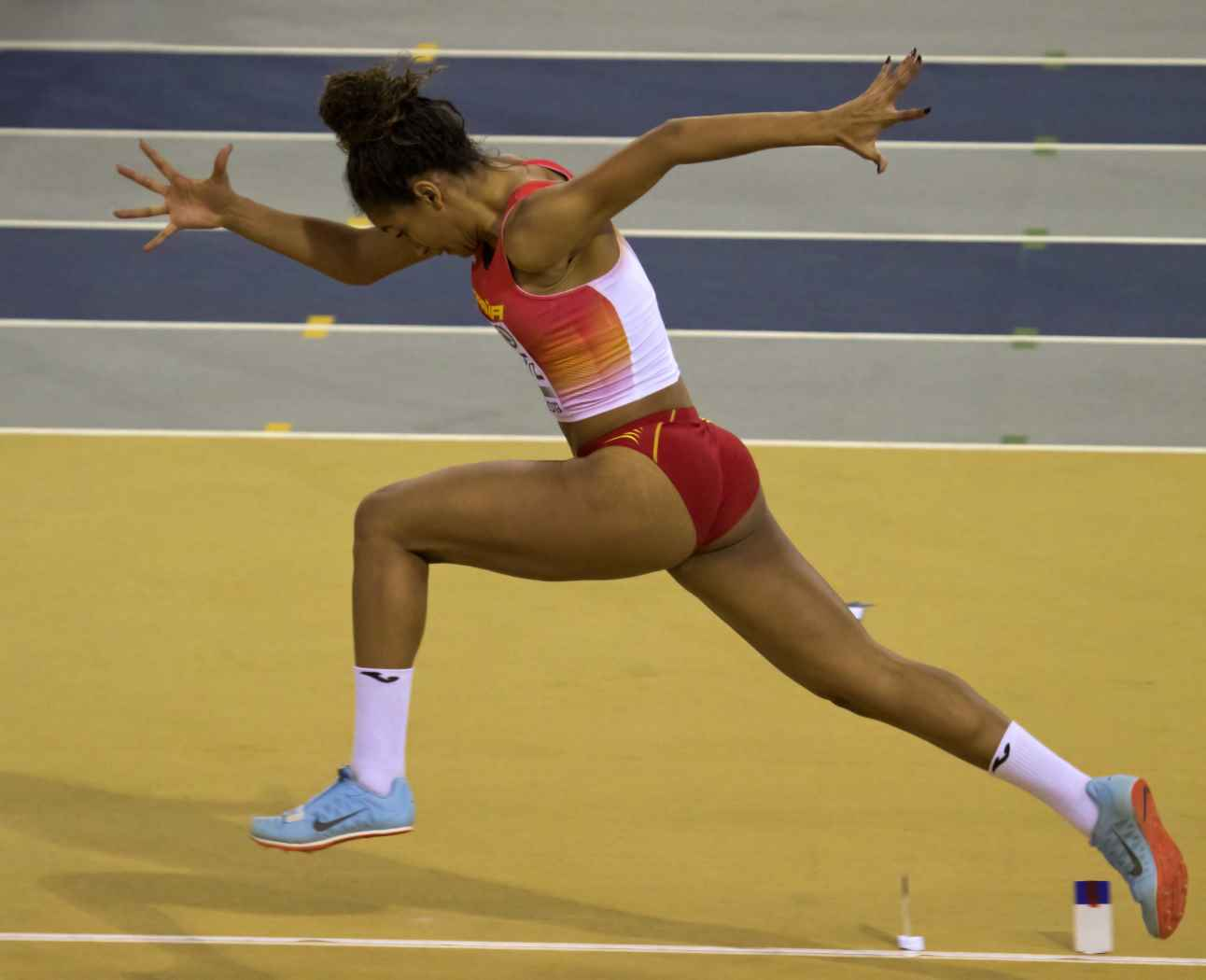 EKI10339 vicente ver 5k